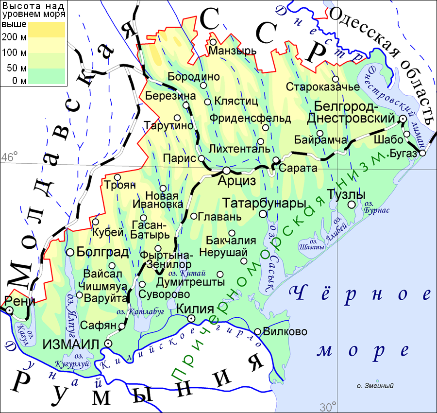 Физическая карта Измаильской области